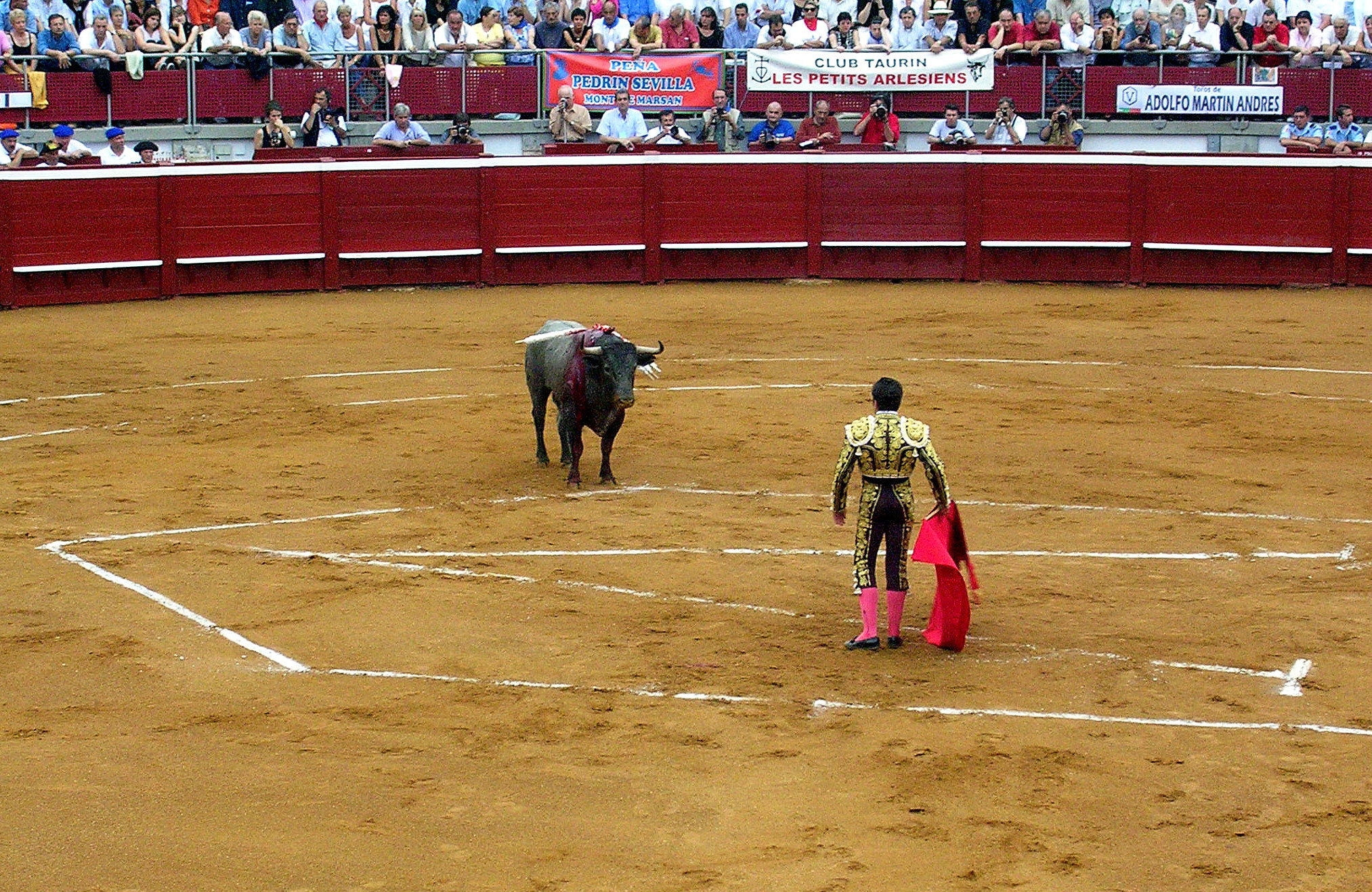 Faena pendant les fêtes de la Madeleine (Landes, France). Photo prise par Jibi44 en juillet 2004.